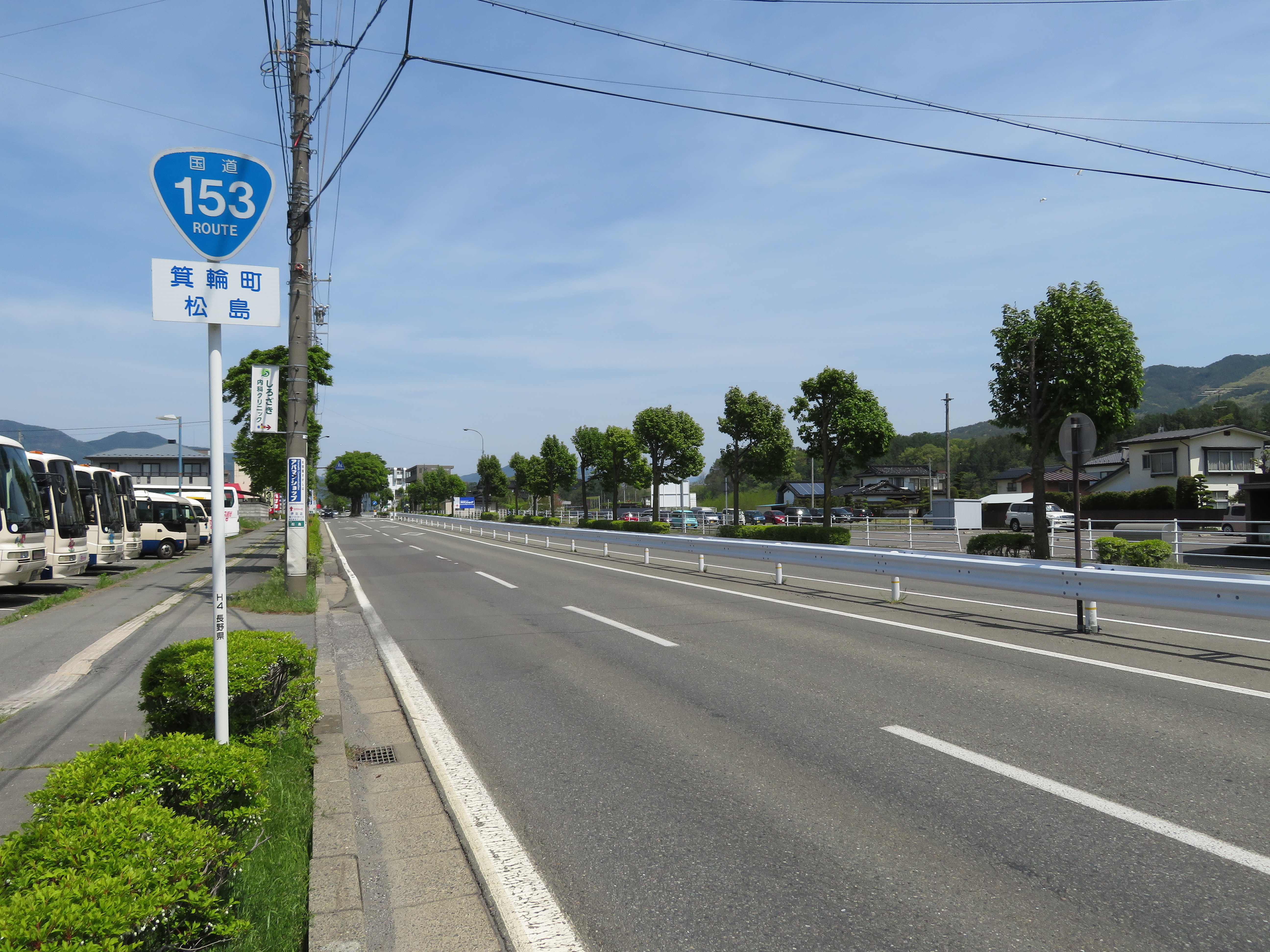 国道153号線 箕輪バイパス 長野県上伊那郡箕輪町松島付近（塩尻方面を撮影） Canon PowerShot SX720 HS